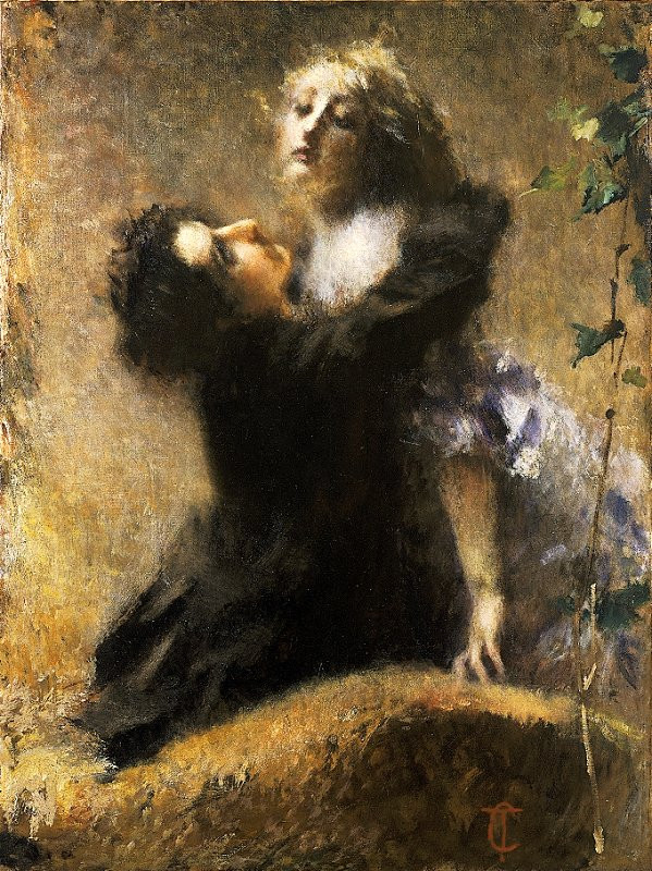 L'edera, olio su tela, cm 133 x 99,5. Torino, Galleria d’Arte Moderna